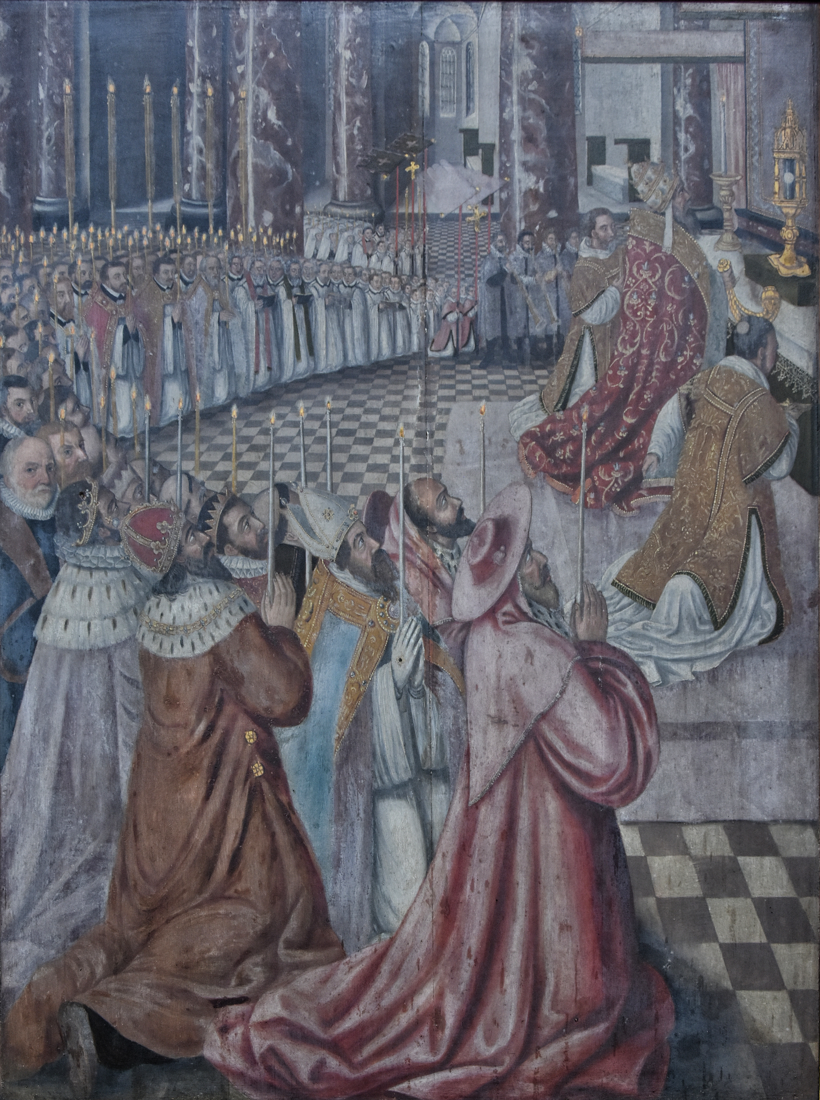 Lucas II Horenbout (c.1560-1626) De fontein des levens OLV Ter Hoyekerk Gent 22-06-2019 14-23-30 This photo of movable heritage has been taken in the Flemish Region